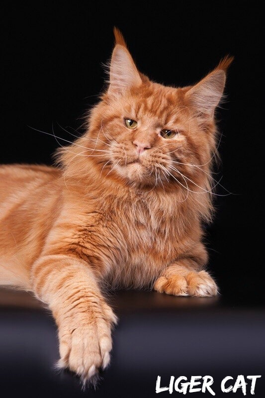 Мейн Кун